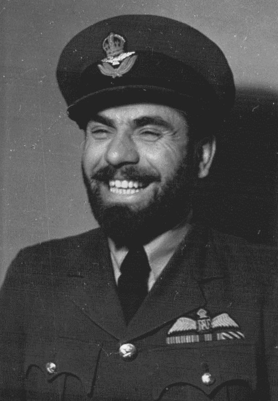 Generálporučík František Fajtl